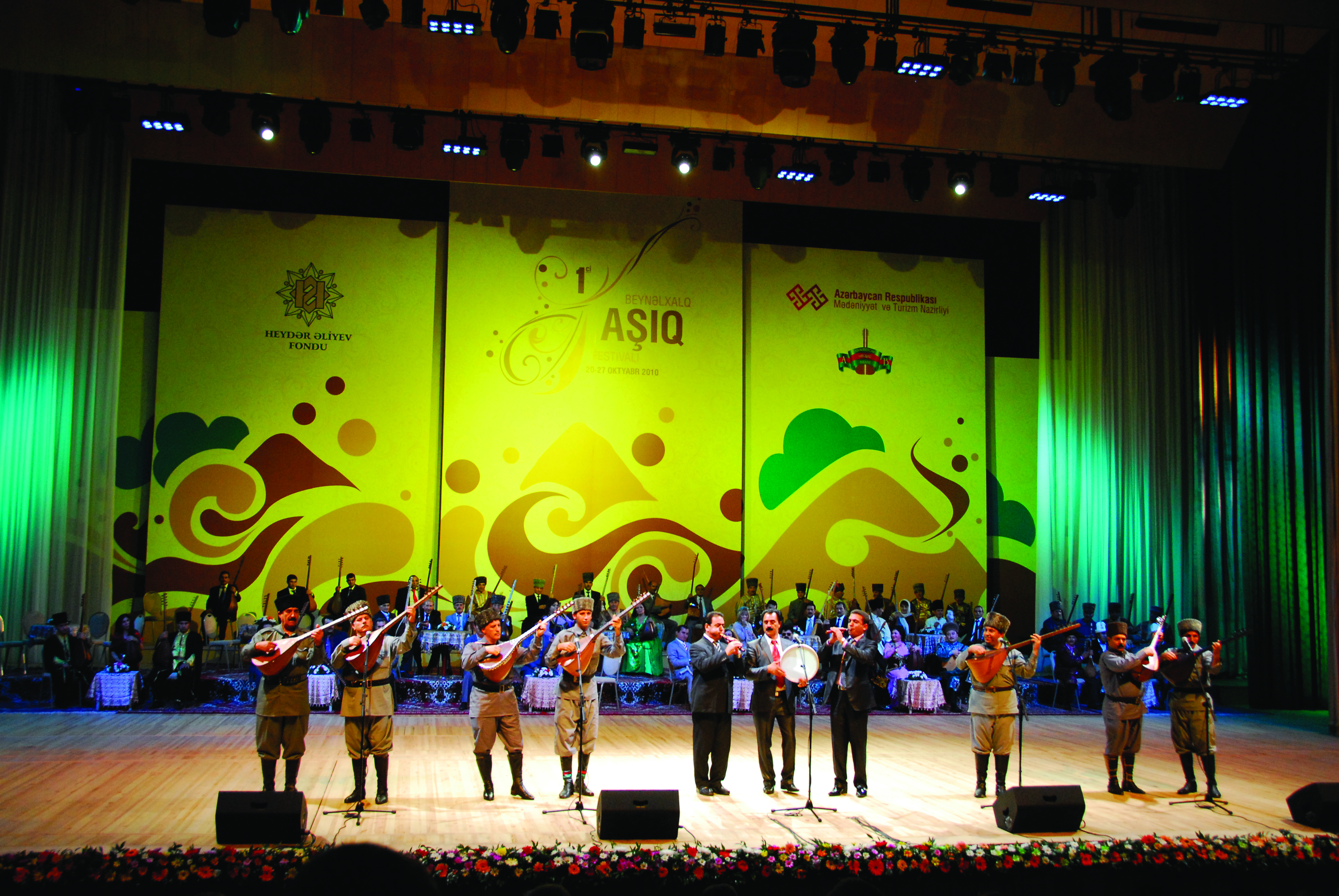 Beynəlxalq Aşıq Festivalı